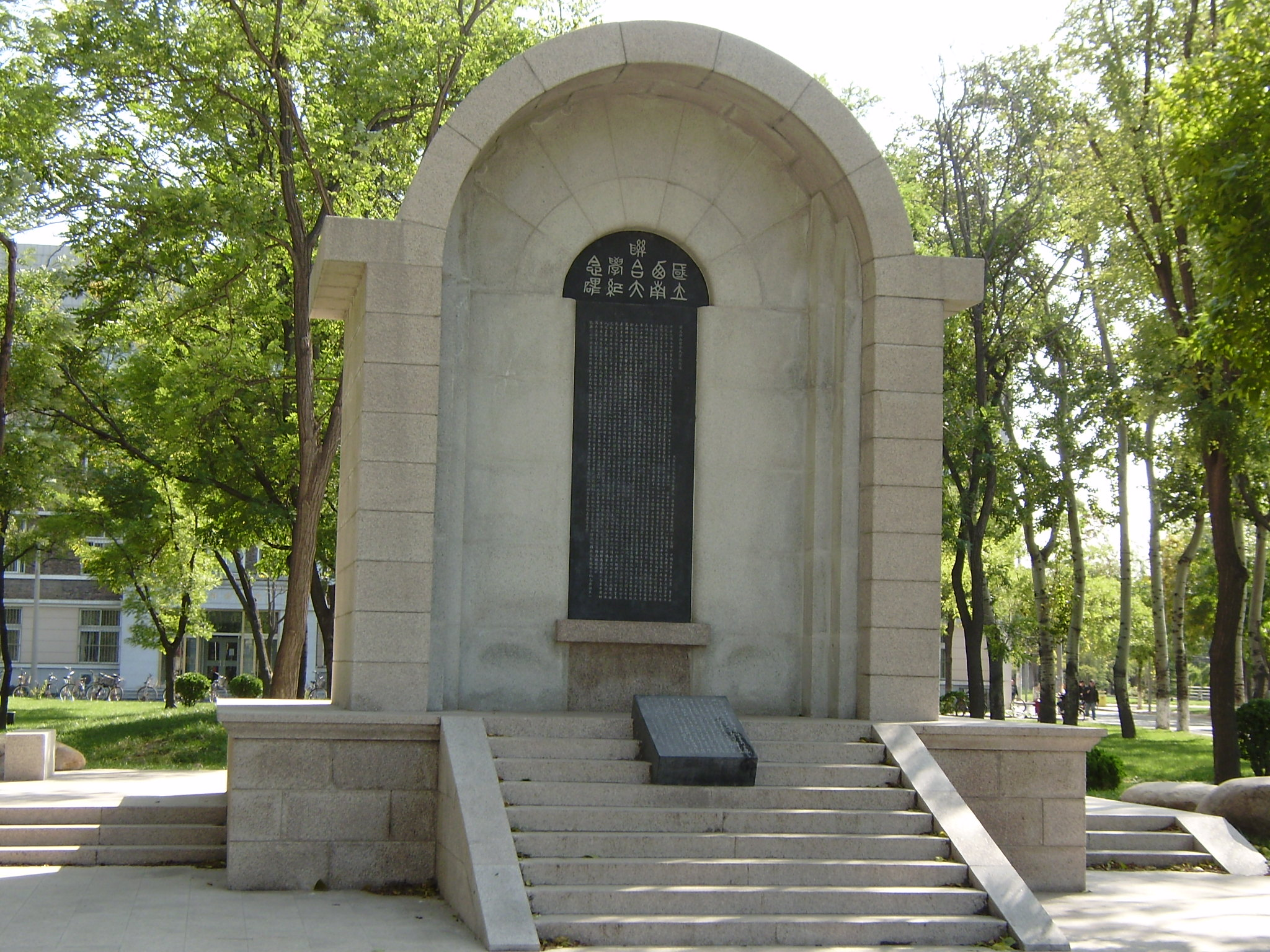 天津南开大学西南联大纪念碑